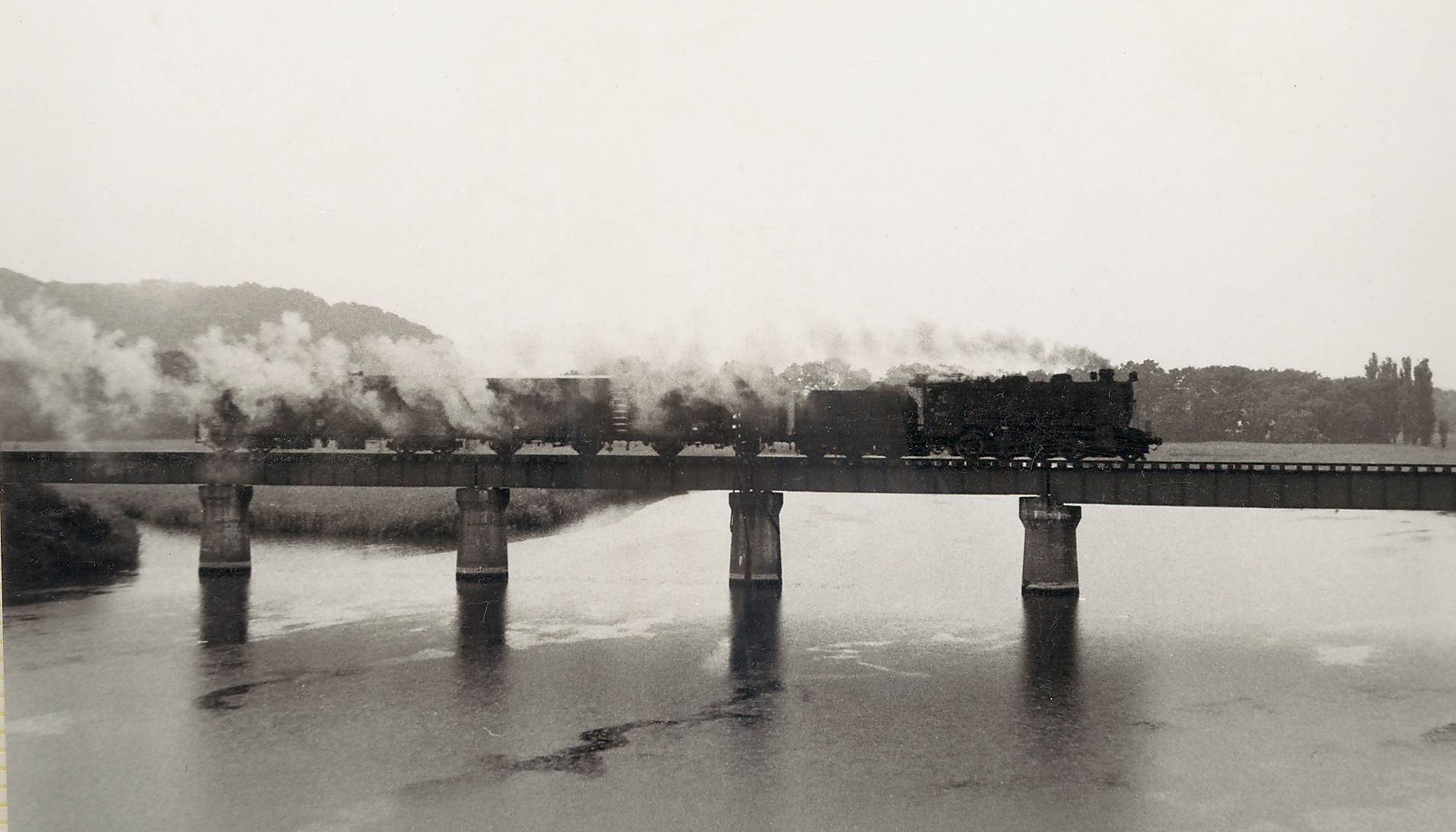 網走川を渡る9600形牽引の湧網線下り貨物列車。大曲→二見ヶ岡。昭和49年頃。